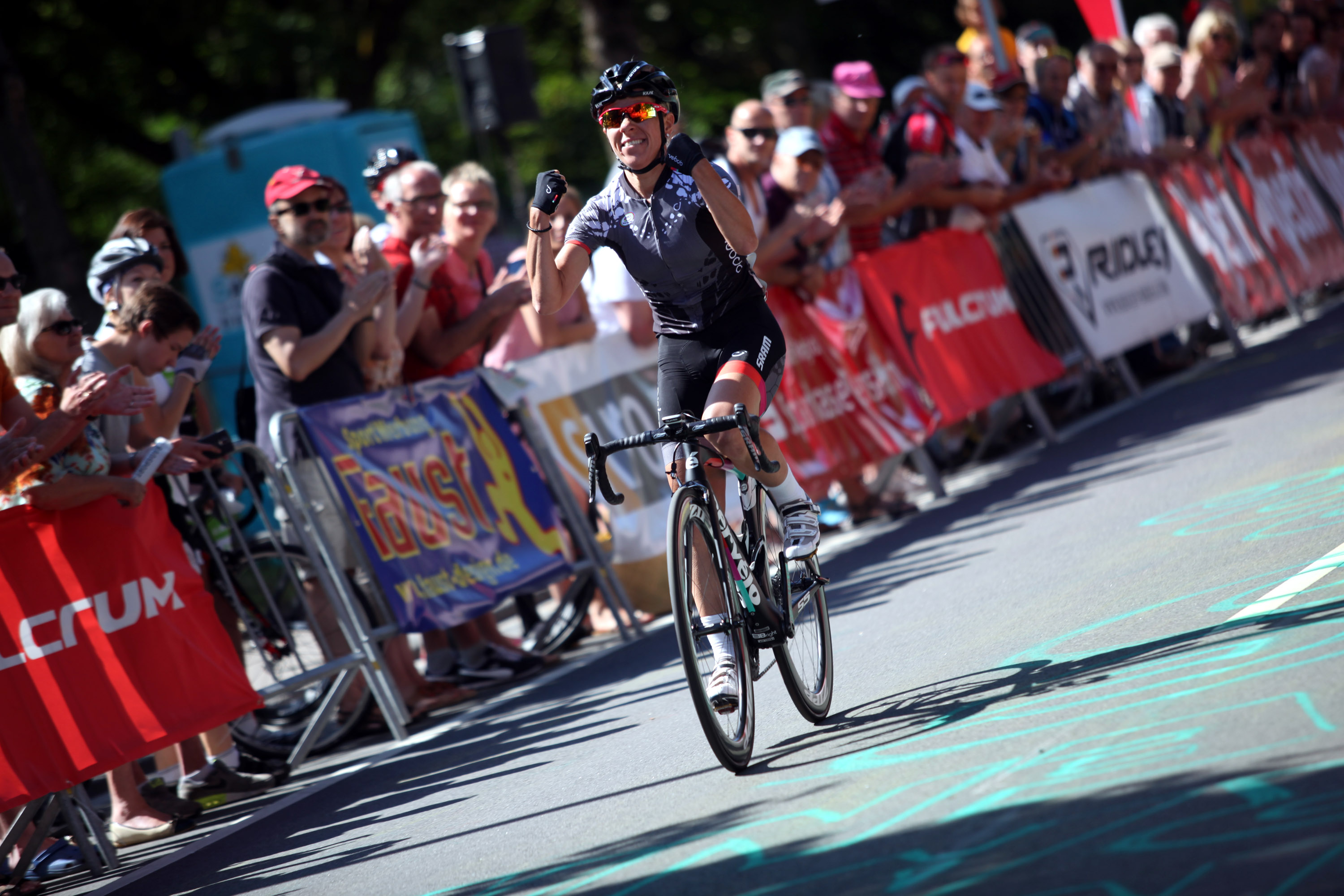 Trixi Worrack beim der Zieleinfahrt. Foto von den Deutschen Meisterschaften im Straßenrennen der Frauen (Elite) am 28. Juni 2015 in Bensheim (Hessen)